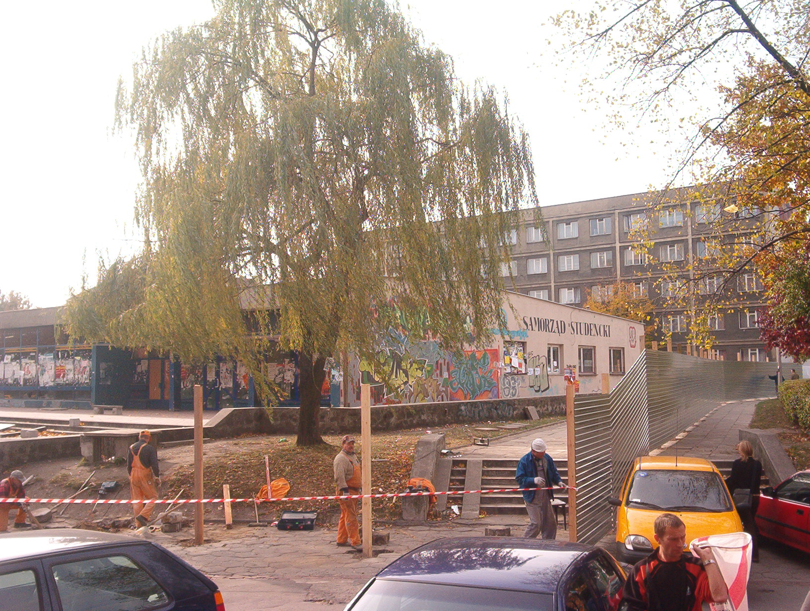 Klub studencki "Kocioł" w Opolu przed rozbiórką